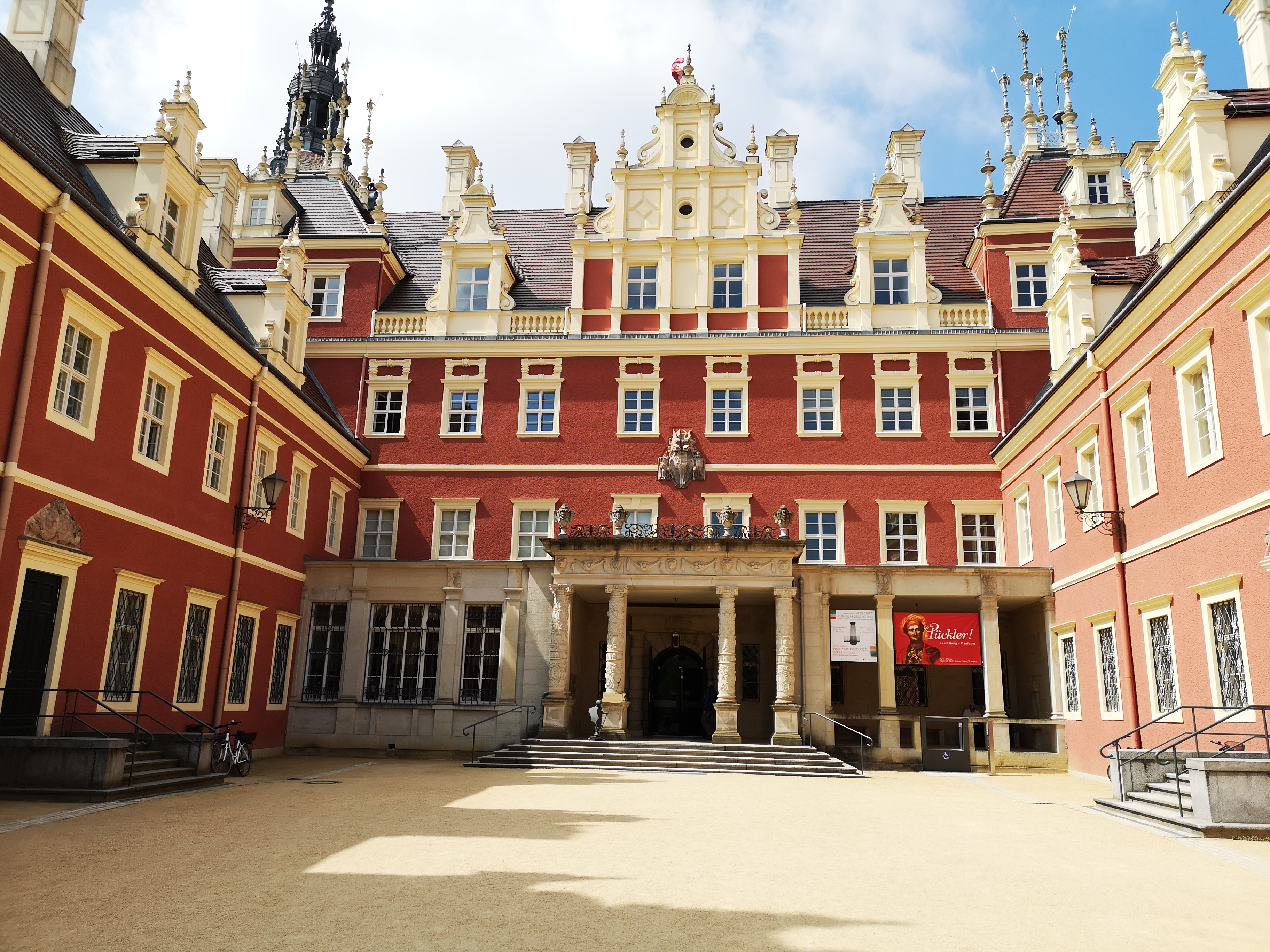 Wejście do Nowego Zamku w Bad Muskau.